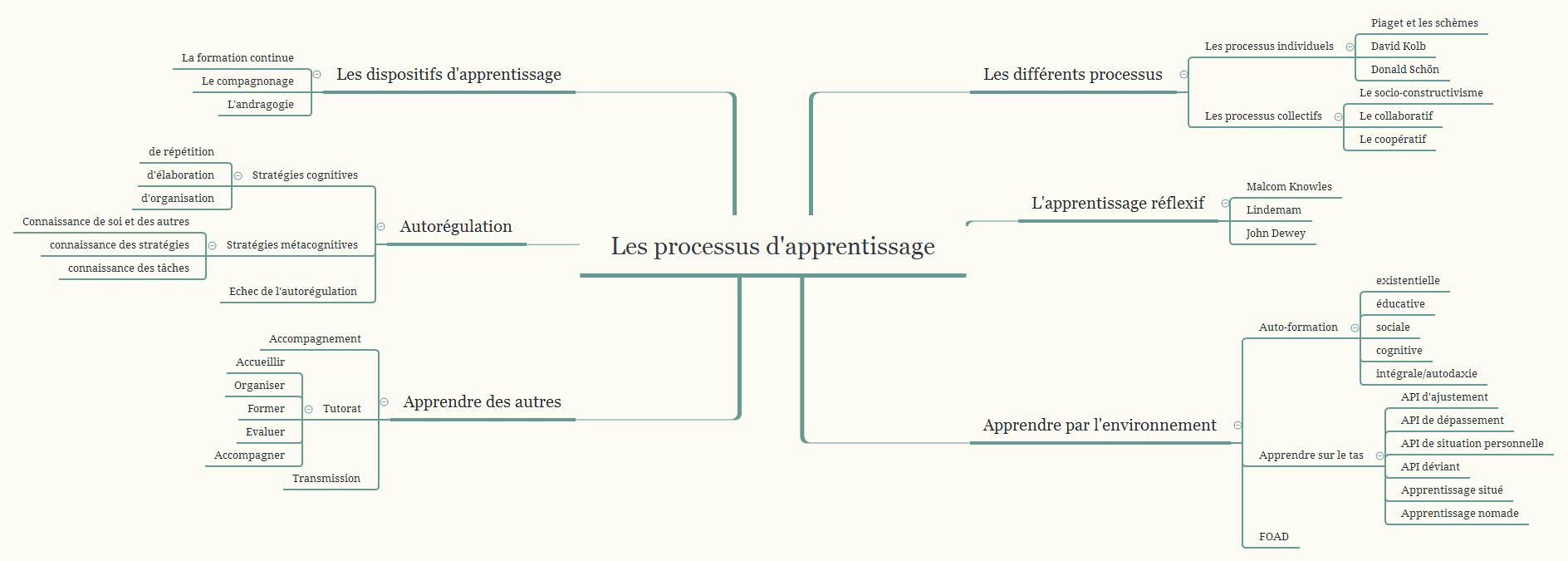 carte mentale